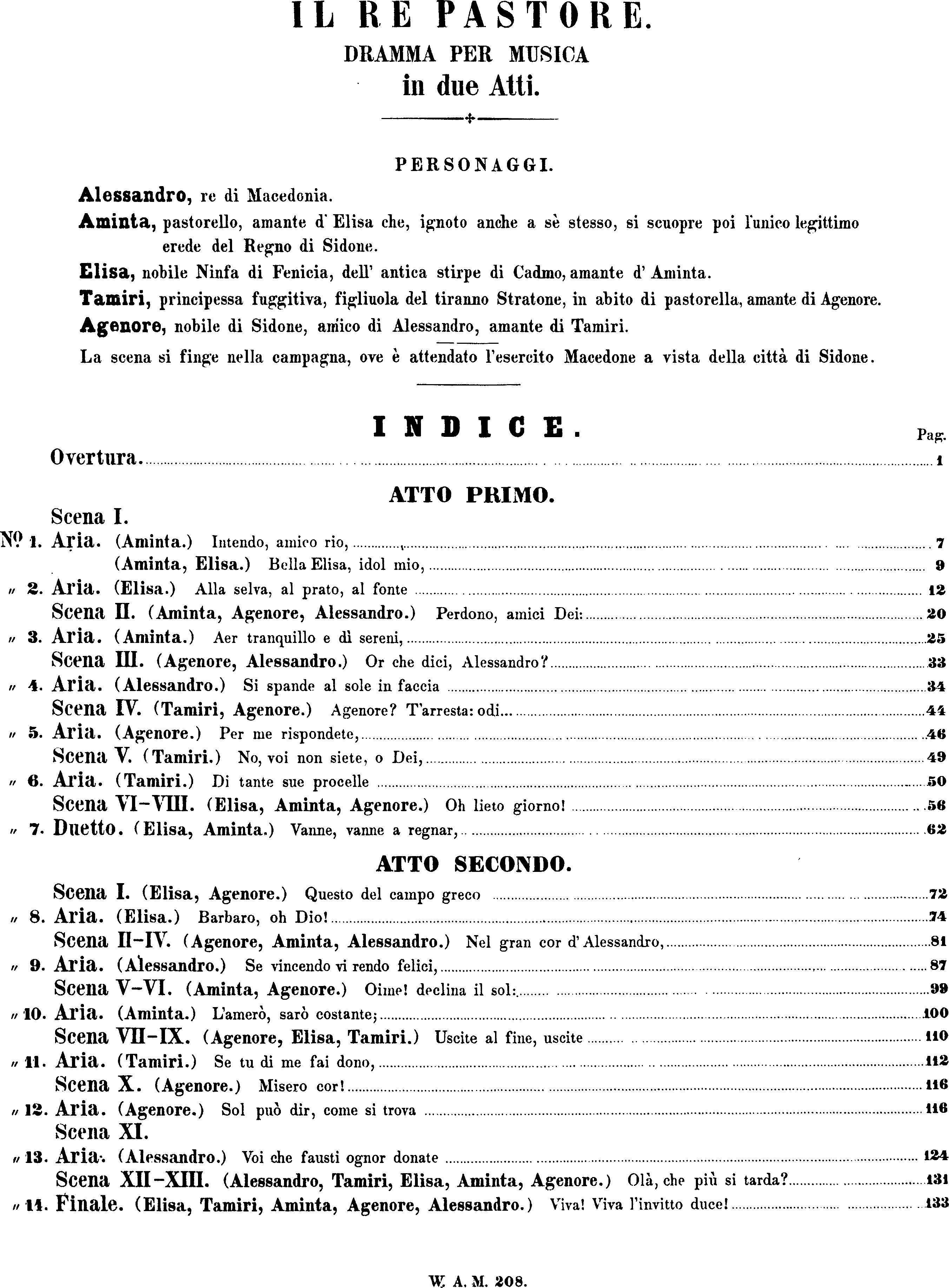 Wolfgang Amadeus Mozart - Il re pastore - Personaggi and Indice